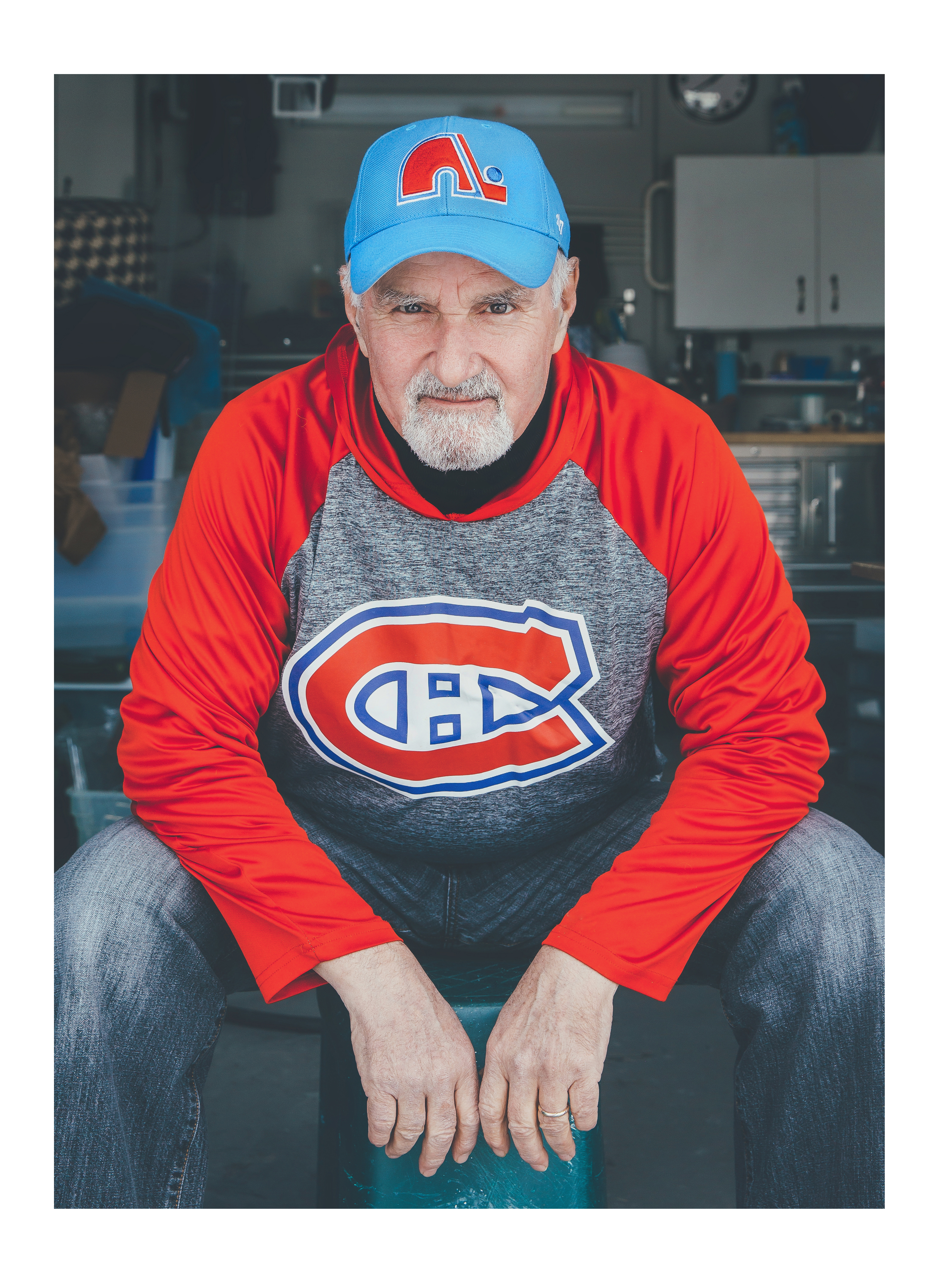 Christian Tétreault (crédit : François Couture)